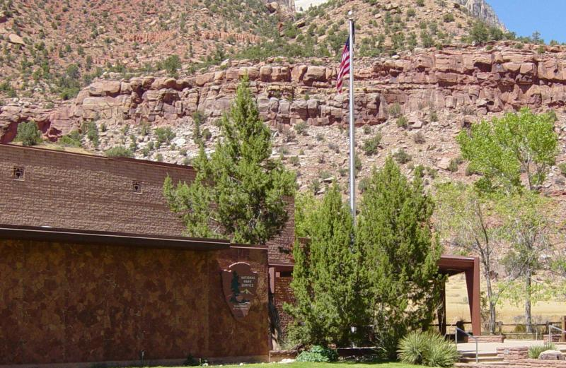 Museo del Hombre Zion